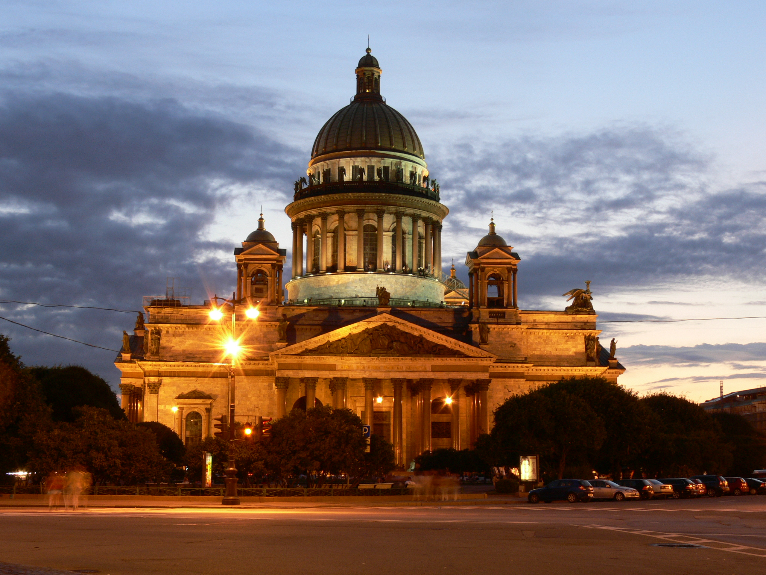 Санкт-Петербург